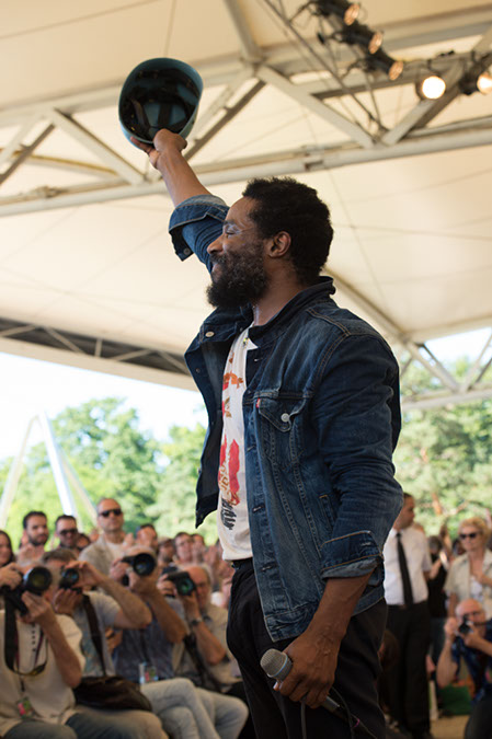 CODY CHESNUT AU PARIS JAZZ FESTIVAL